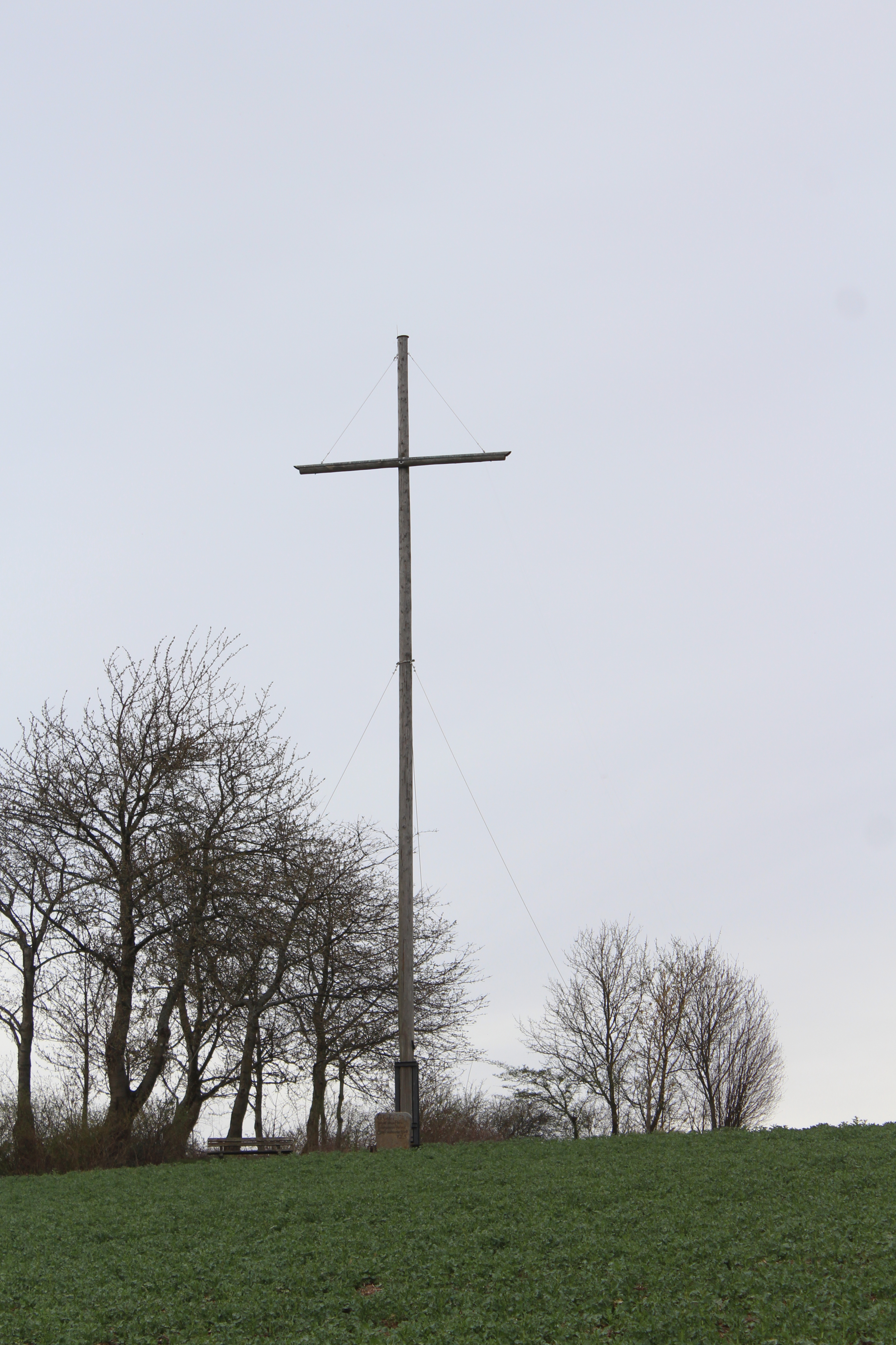 Gedenkkreuz nördlich von Schönau an der Brenz